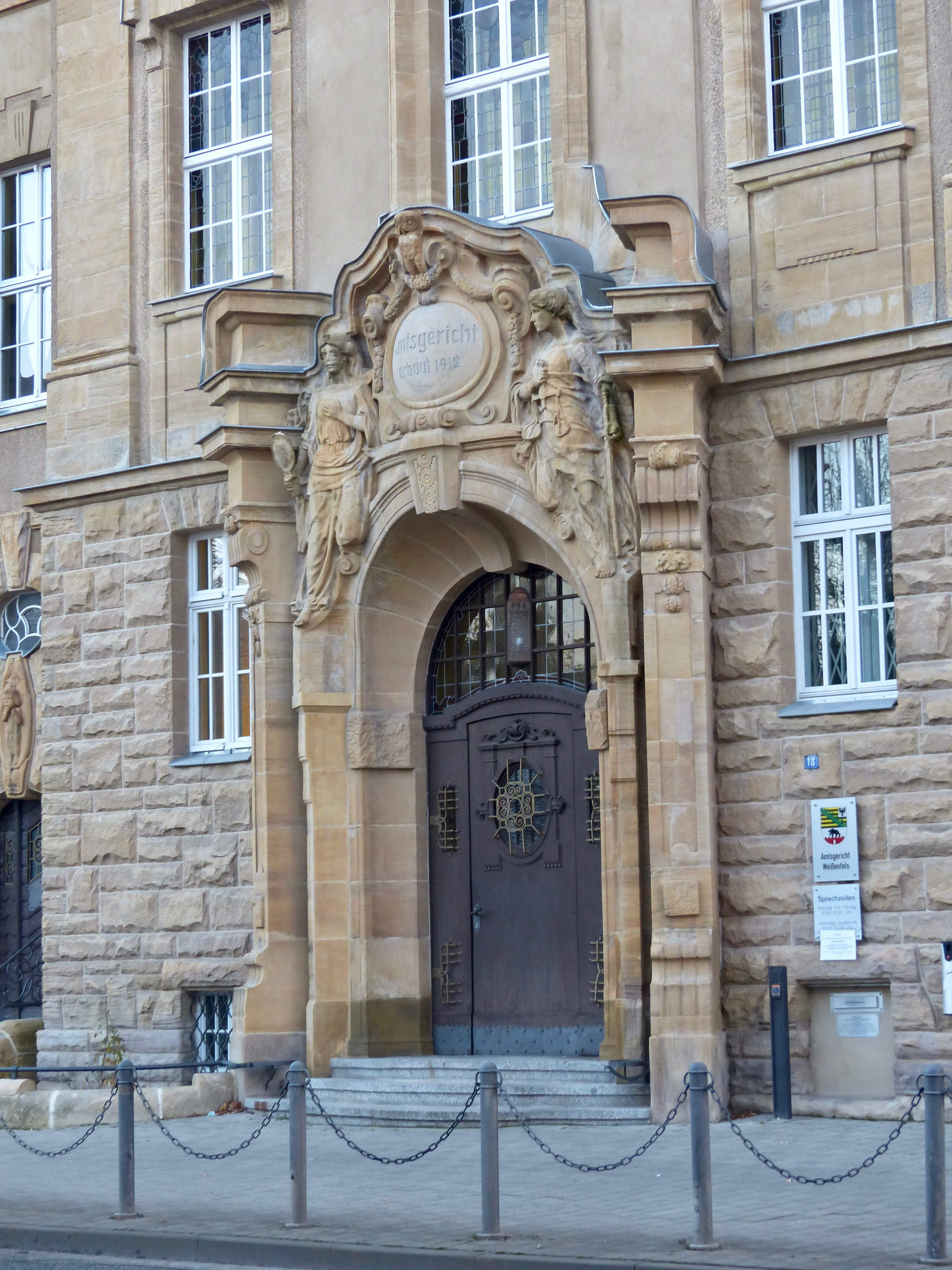 Amtsgericht Weißenfels, Denkmalnummer 094 09275, Friedrichsstr. 18